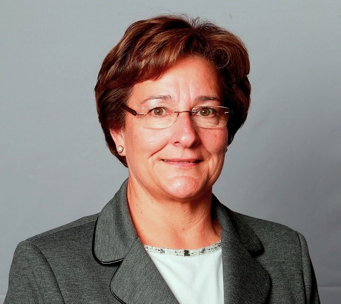 Montserrat Roura i Massaneda és una política catalana, diputada al Parlament de Catalunya en la IX i X legislatures.